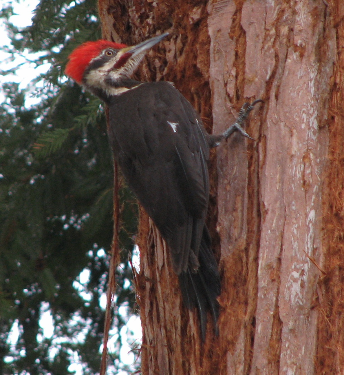 Grand pic (Dryocopus pileatus) mâle